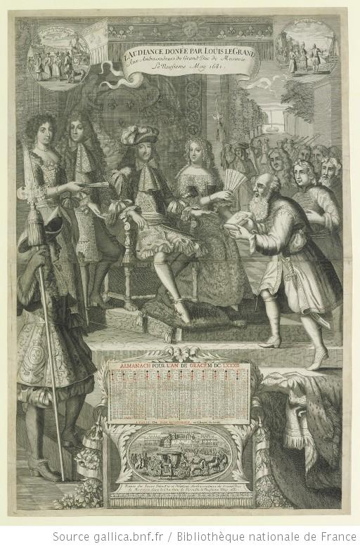 L'AUDIANCE DONÈE PAR LOÜIS LE GRAND / Aux Ambassadeurs du Grand Duc de Moscovie / Le Neufieme May 1681 : [estampe]